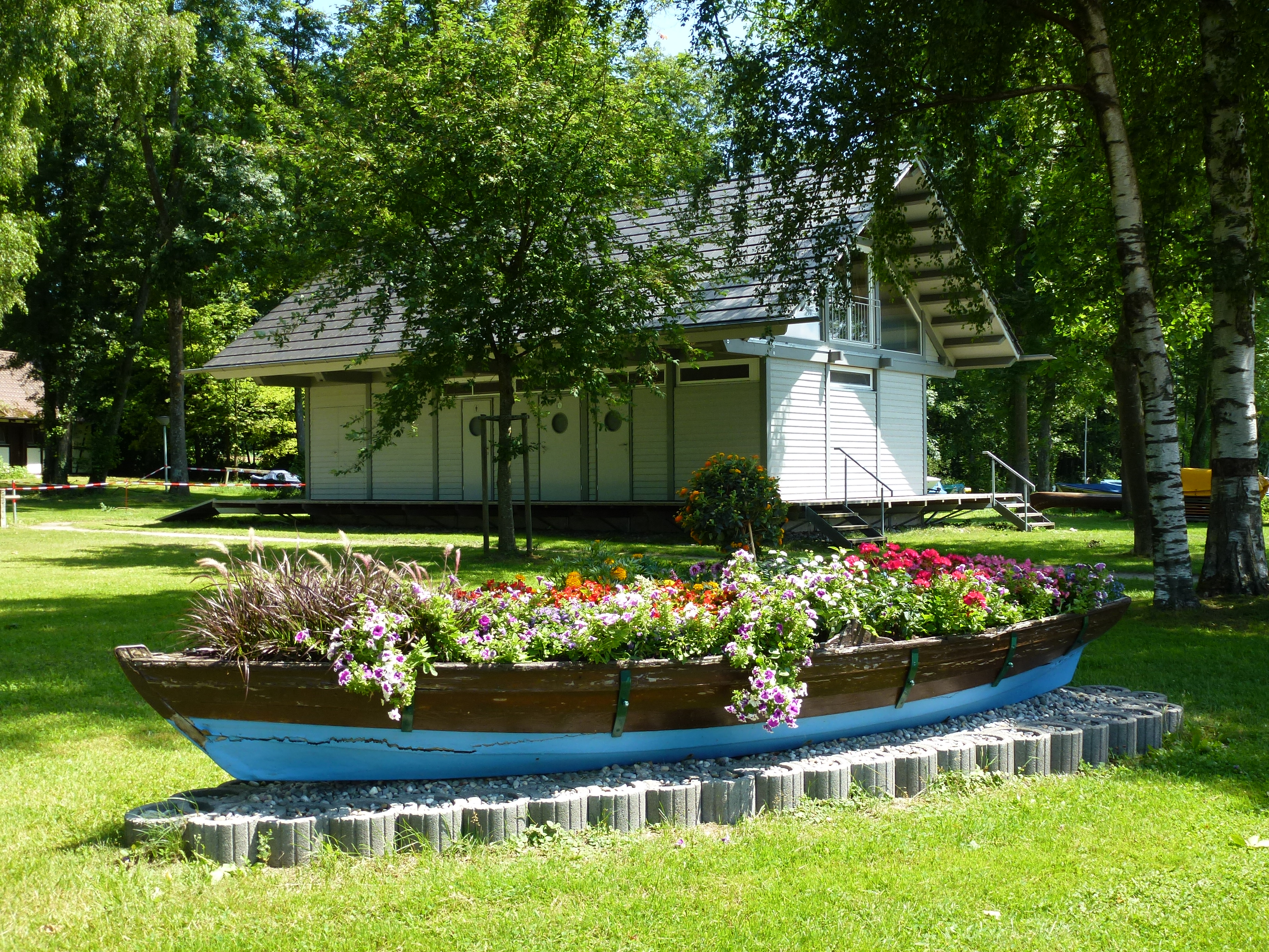 Hafen in Öhningen mit Dusch- und Toilettenhaus für Bootsgäste der Anlagestelle.